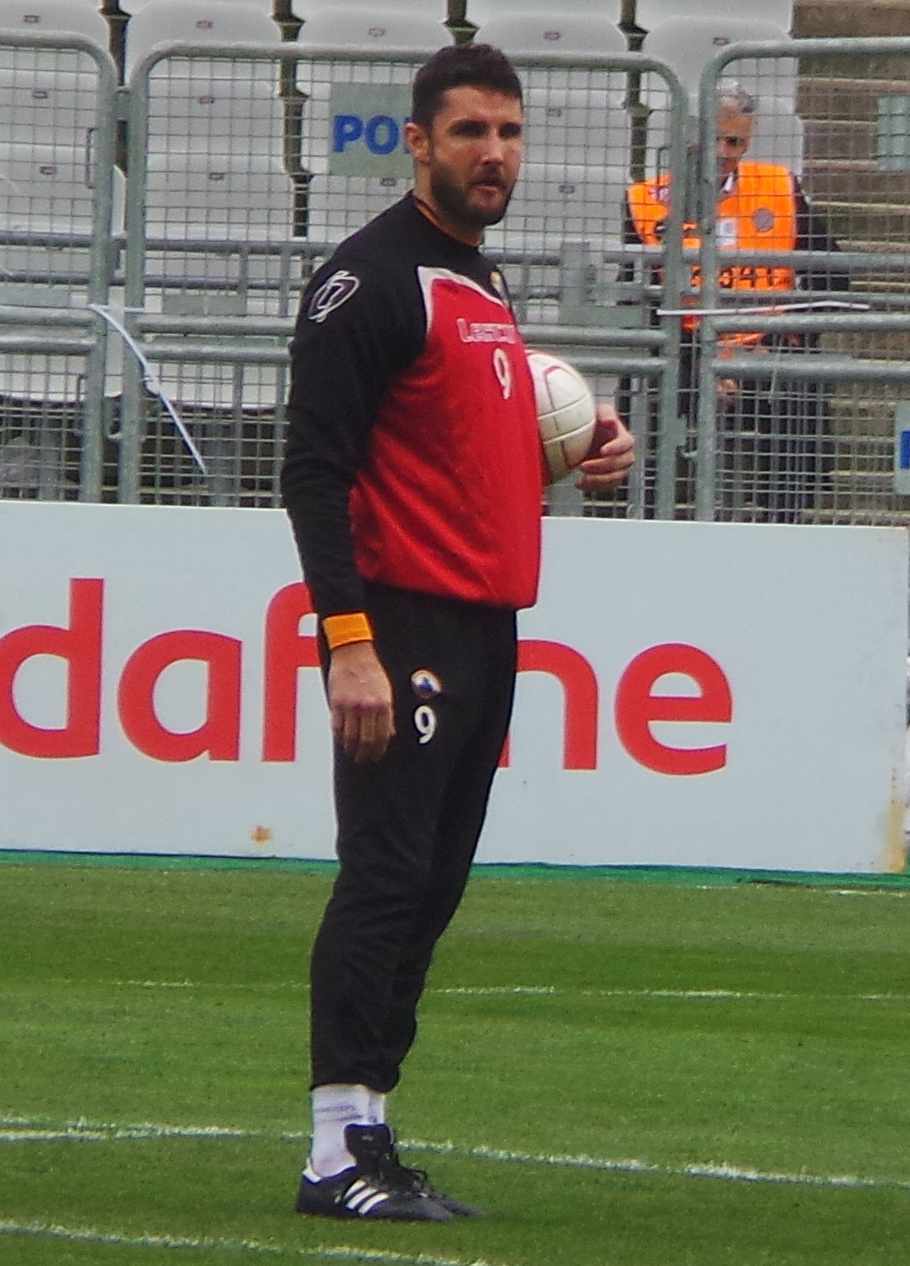 Orkun Usak'14